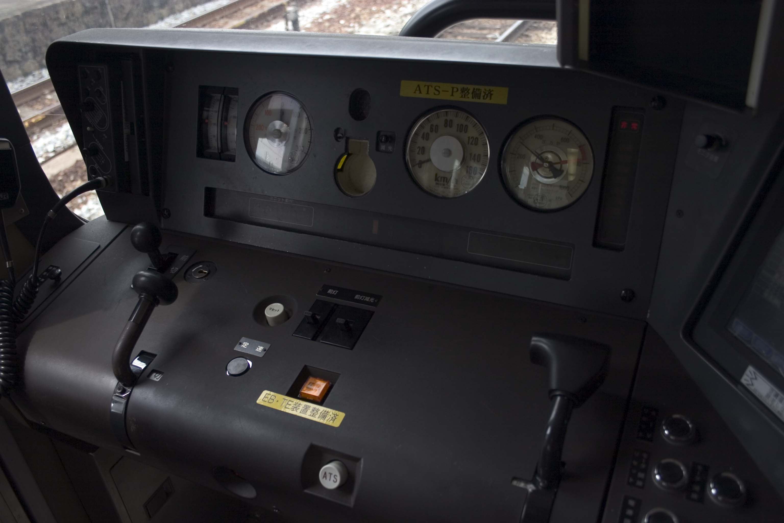 223系2000番の運転コントロール